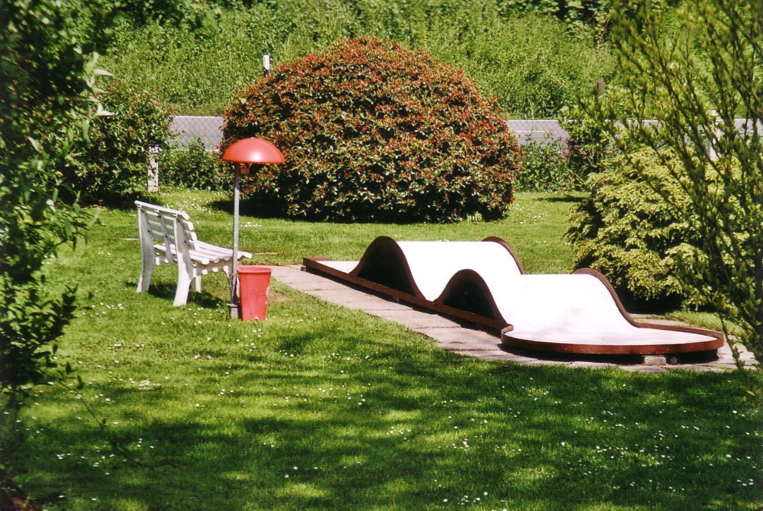 Minigolfanlage an der Wetterstraße in Herdecke